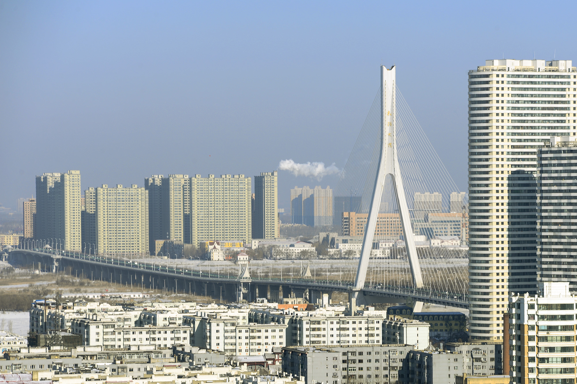 松浦大桥一直没机会特地去拍啊。那就发个在滨江新城楼上拍的吧。这是哈市首次自行组织设计建造的大型跨江桥，主跨部分采取钻石型独塔斜拉结构，主桥长476米（其中主跨268米，边跨208米，跨度位列我国大跨度独塔斜拉桥第八位），采用钢-钢筋砼叠合梁结构；引桥长度3450米，采用钢筋砼连续梁结构。主塔高160米，下塔段18米；中塔段87米向内收缩；上塔段55米。基础采用变径钻孔桩基础，每根长95米共25根 Songpu bridge is the frist bridge which desined and constructed by Harbin city the first time